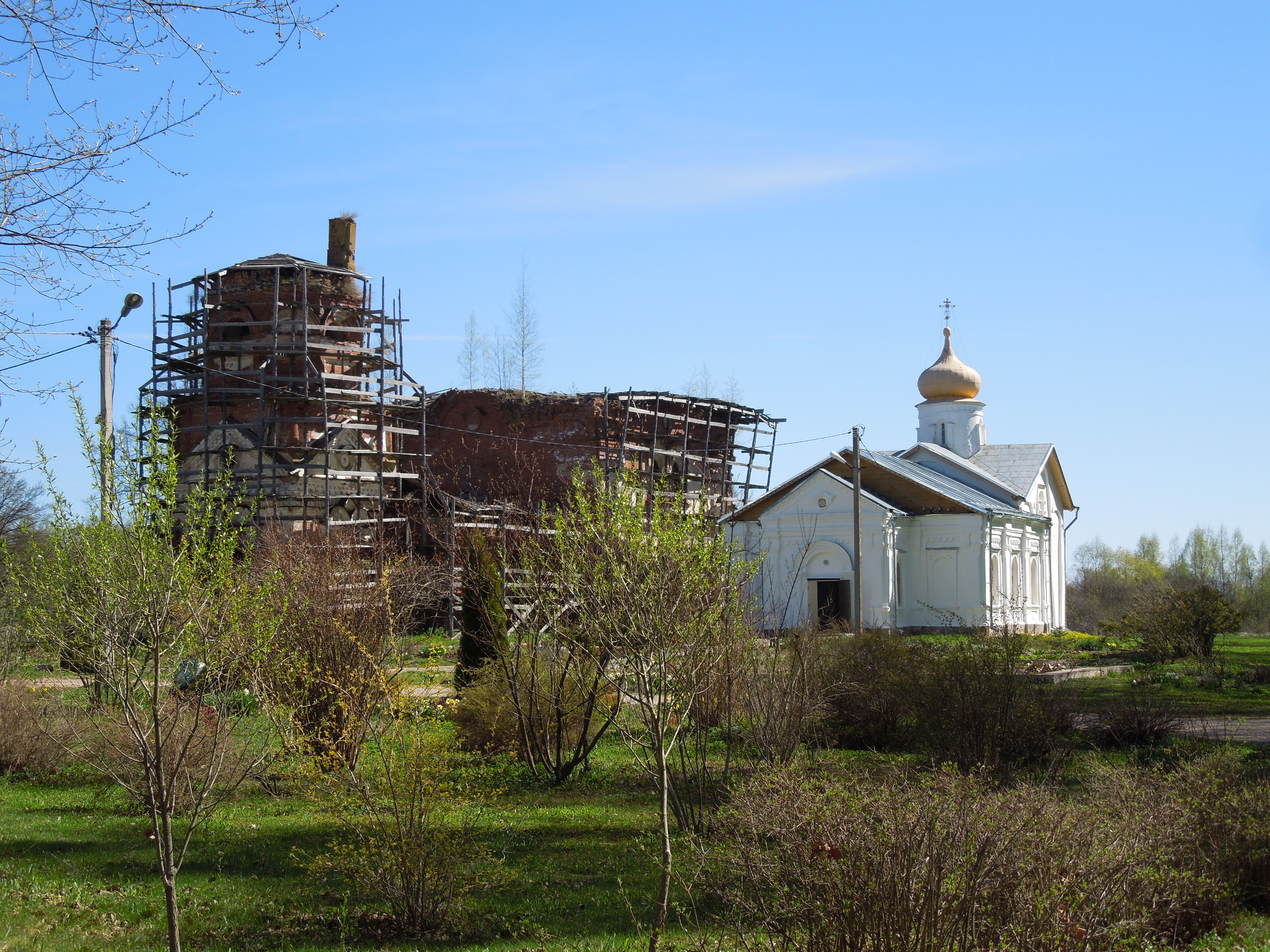 Монастырь Никольский Косинский: Косино, Старорусский район, Новгородская область